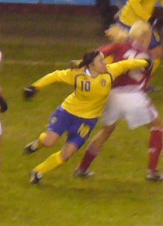 Ханна Юнгберг (№10, жёлто-синяя форма) в матче против сборной Дании.